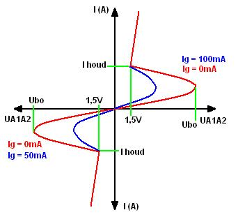 Zelf getekende grafiek